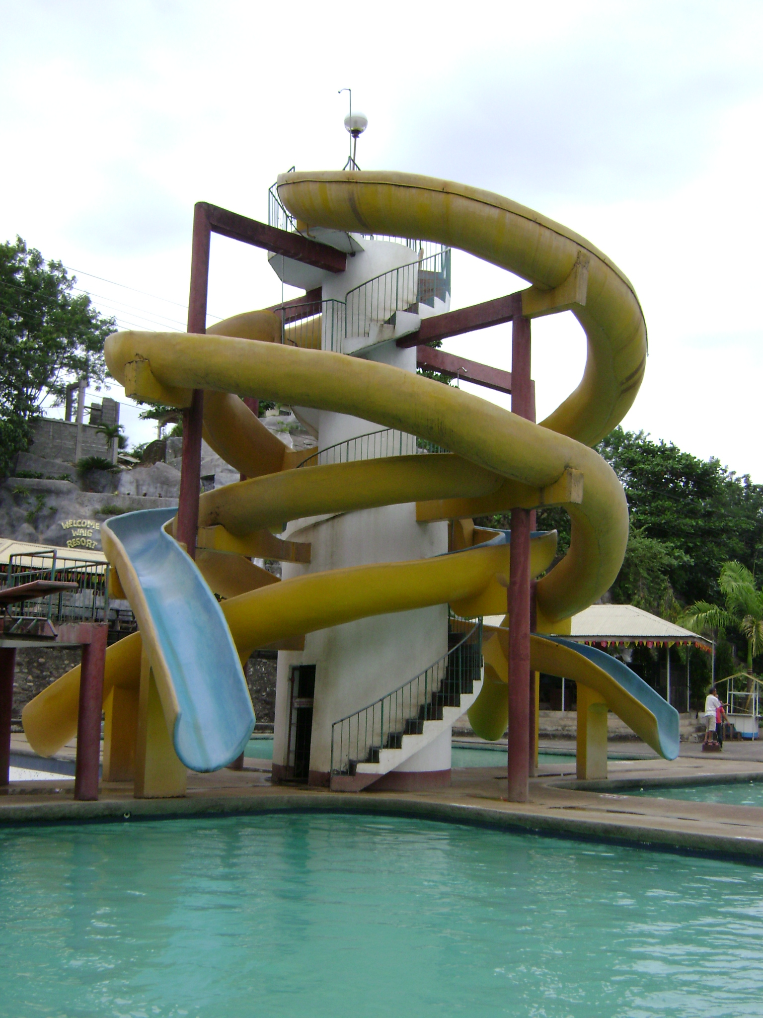 Waig Crystal Spring Resort, Maramag, Bukidnon